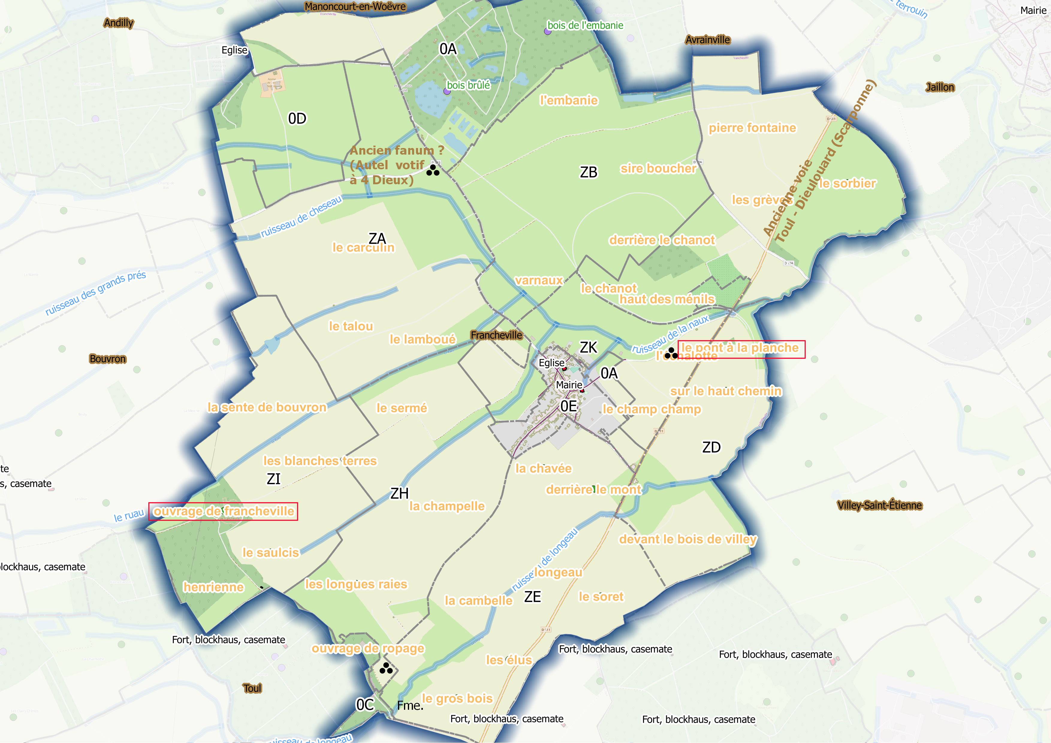 Francheville (ban communal) Qgis et Osm